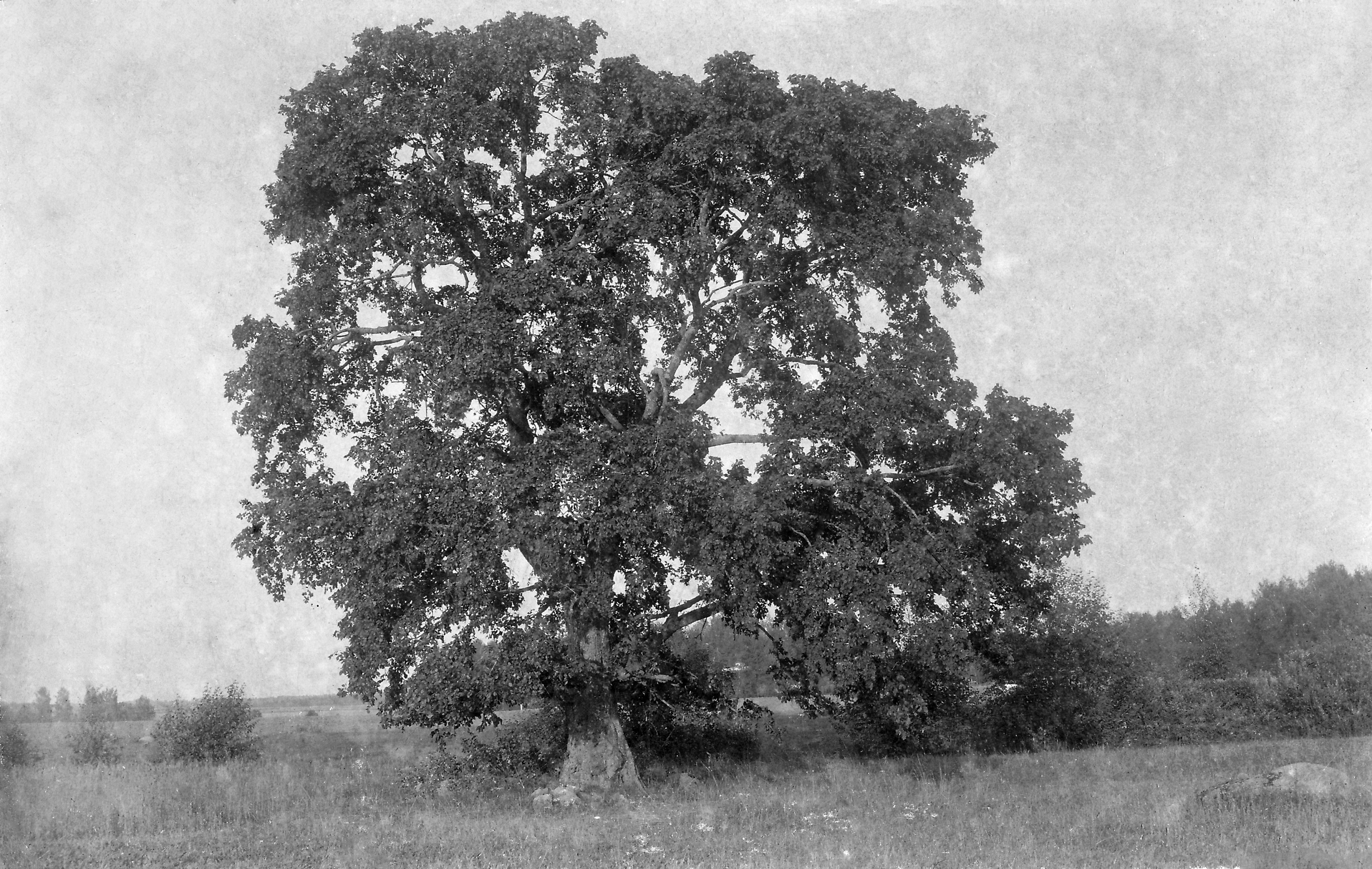 Foto on pärit Feliks Tammeti (1903 - 1995) fotoalbumist. Foto all tekst: "Puuri künnapuu umbes 1925, kui munakivi okste vahel oli juba puu sisse kasvanud."